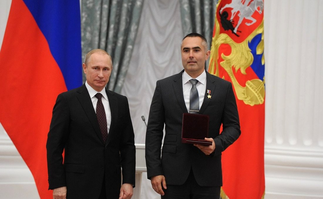 Звание Героя Российской Федерации и почётное звание Летчик-космонавт Российской Федерации присвоено Евгению Тарелкину